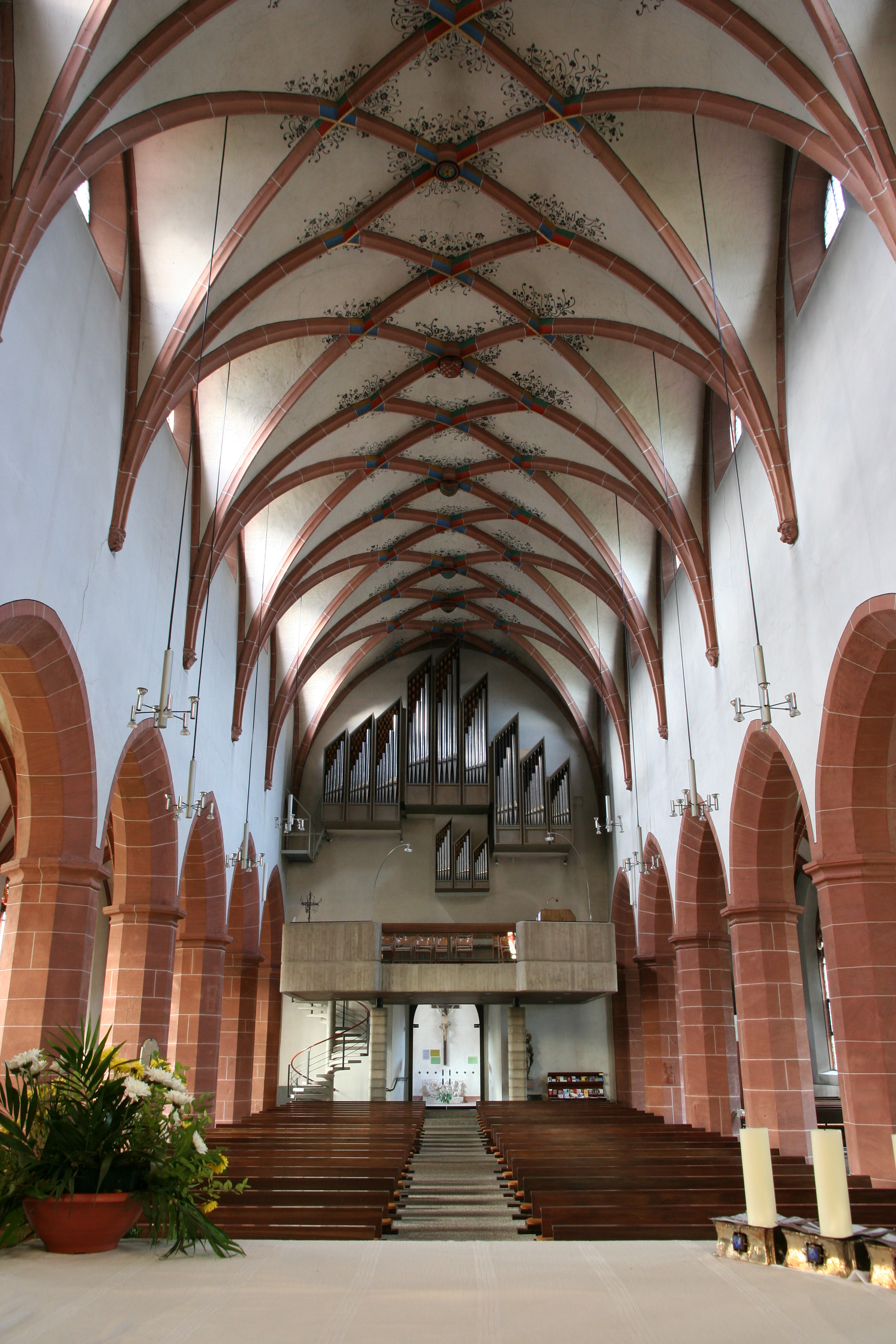 Römisch-katholische Liebfrauenkirche Gernsbach